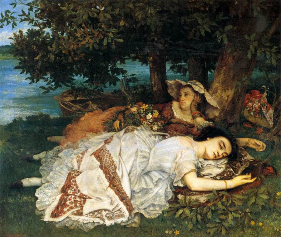 Realismo rappresentato da Coubret,attraverso le donne adagiate sulla Senna.